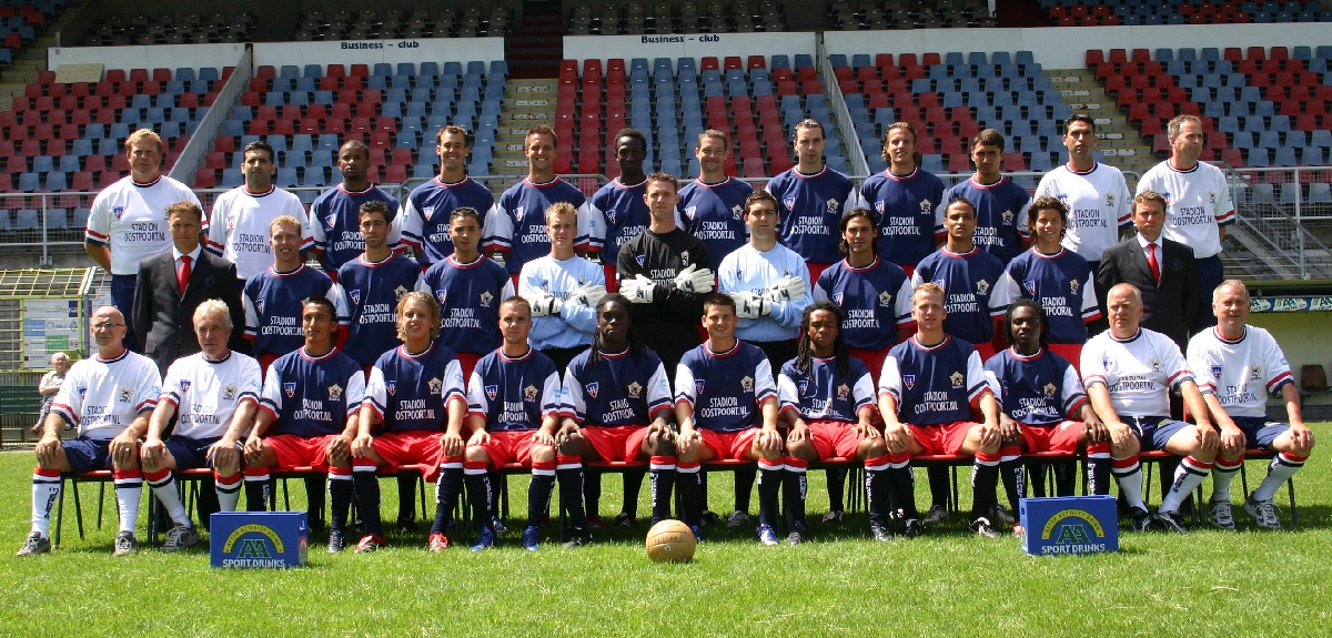 eigen foto. Gemaakt op fotopersdag HFC Haarlem seizoen 06-07... foto komt NIET van